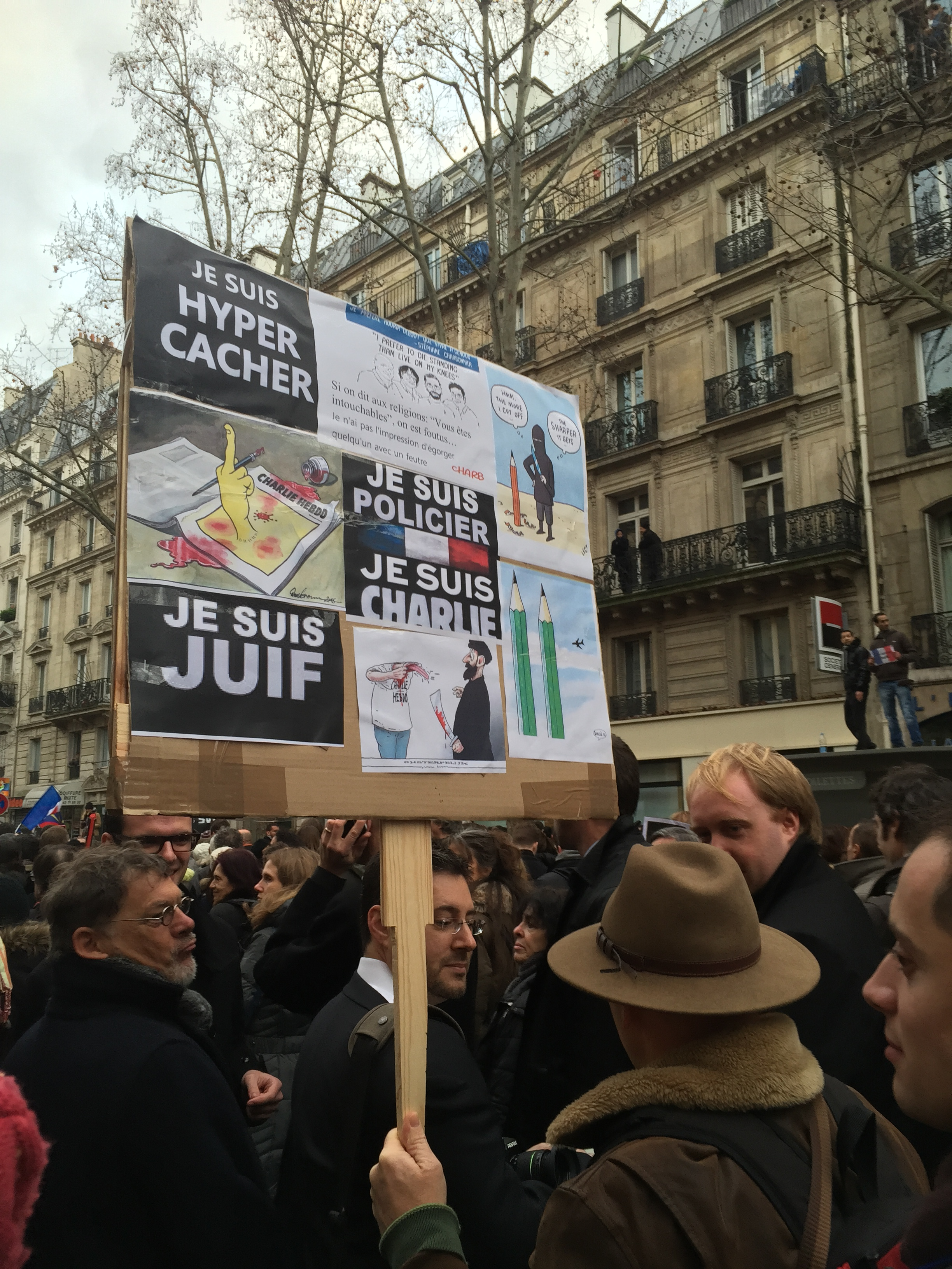 Une affiche durant la marche républicaine du 11 janvier 2015